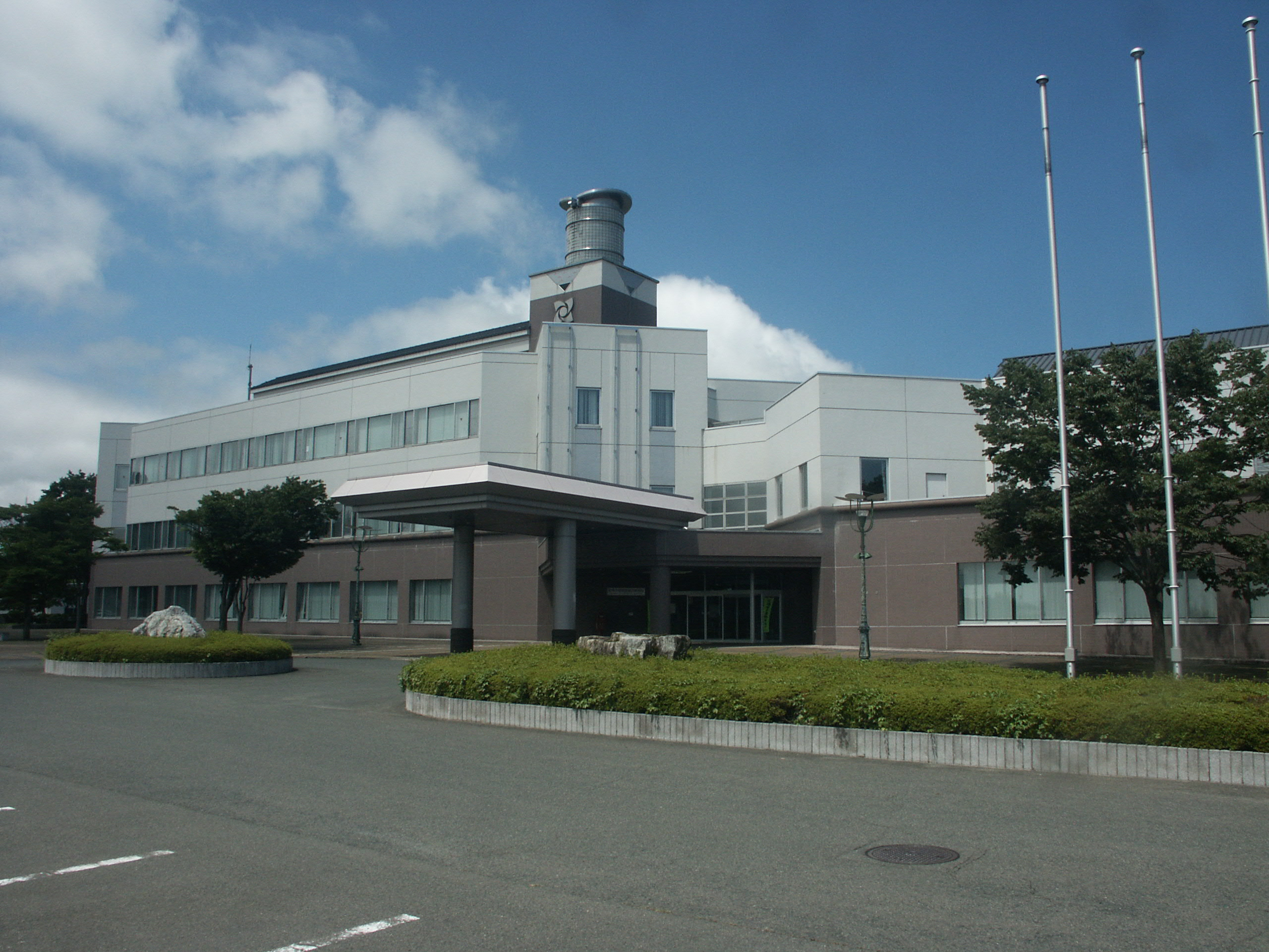 花巻市役所石鳥谷総合支所（旧石鳥谷町役場）庁舎